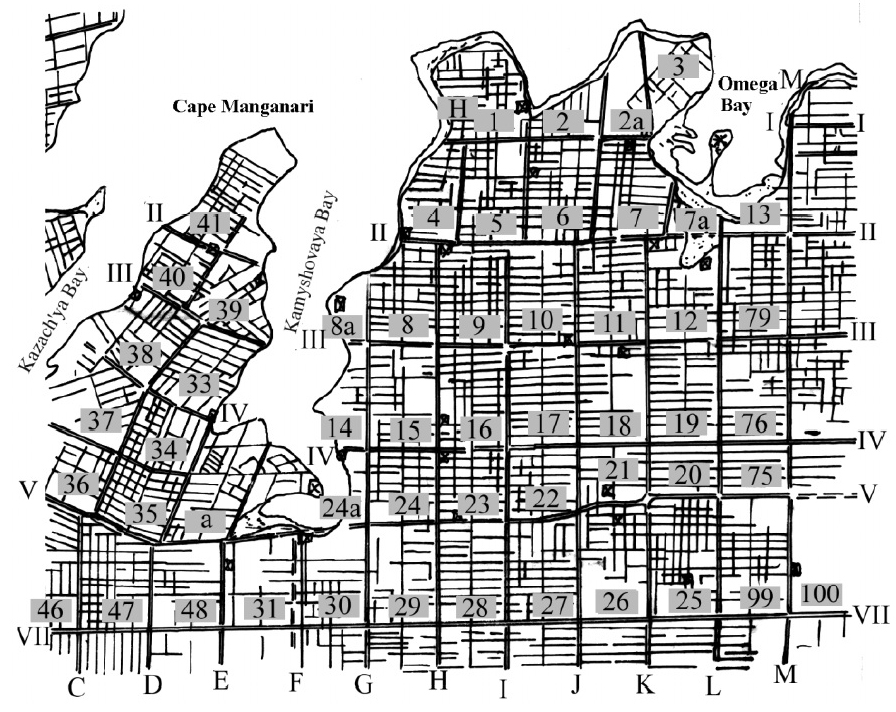 Фрагмент межевания Гераклейского полуострова